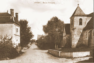 Lindry (Yonne) - route d'Auxerre vers 1900.